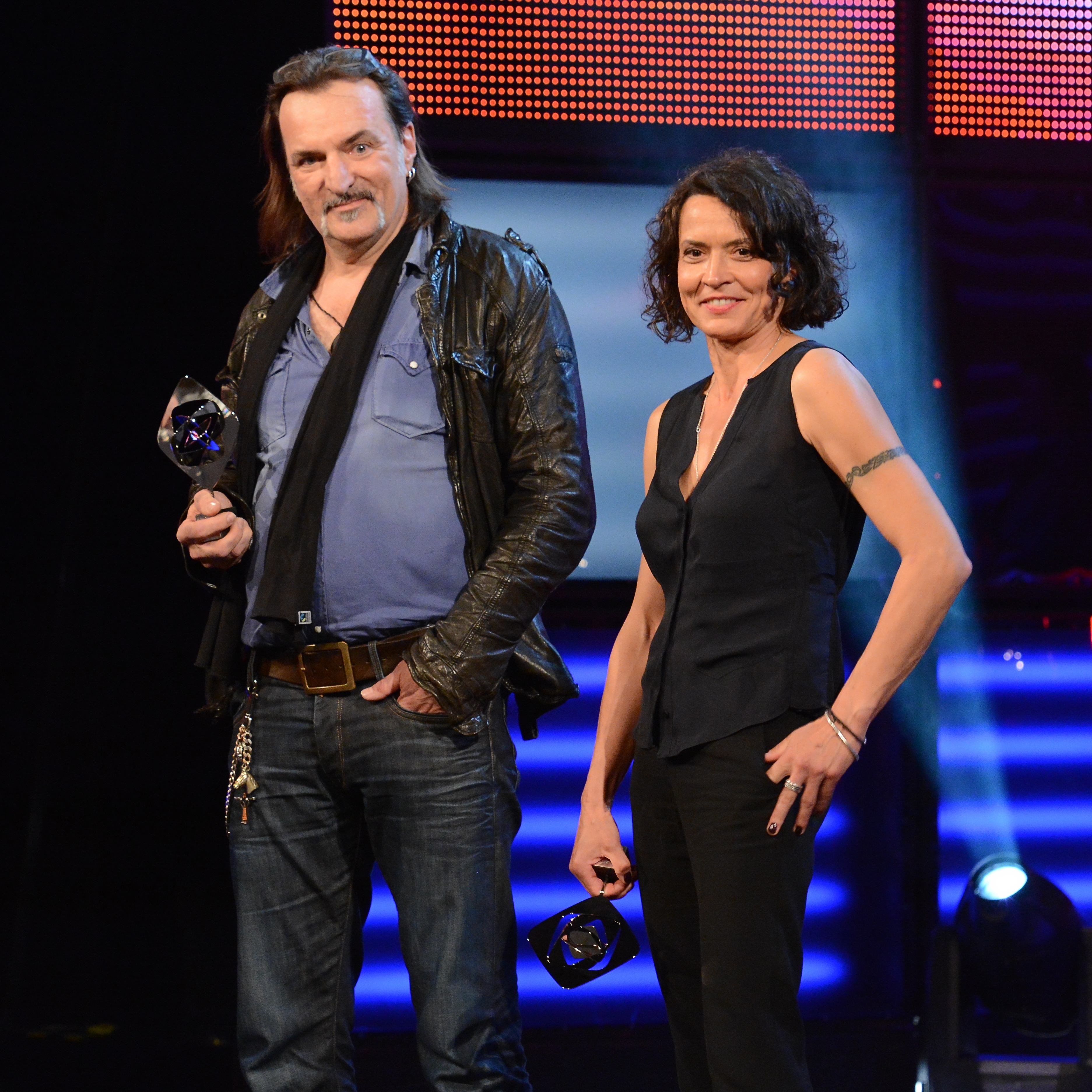 Ulrike Folkerts und Andreas Hoppe bei der Verleihung des Grimme-Preises 2014.